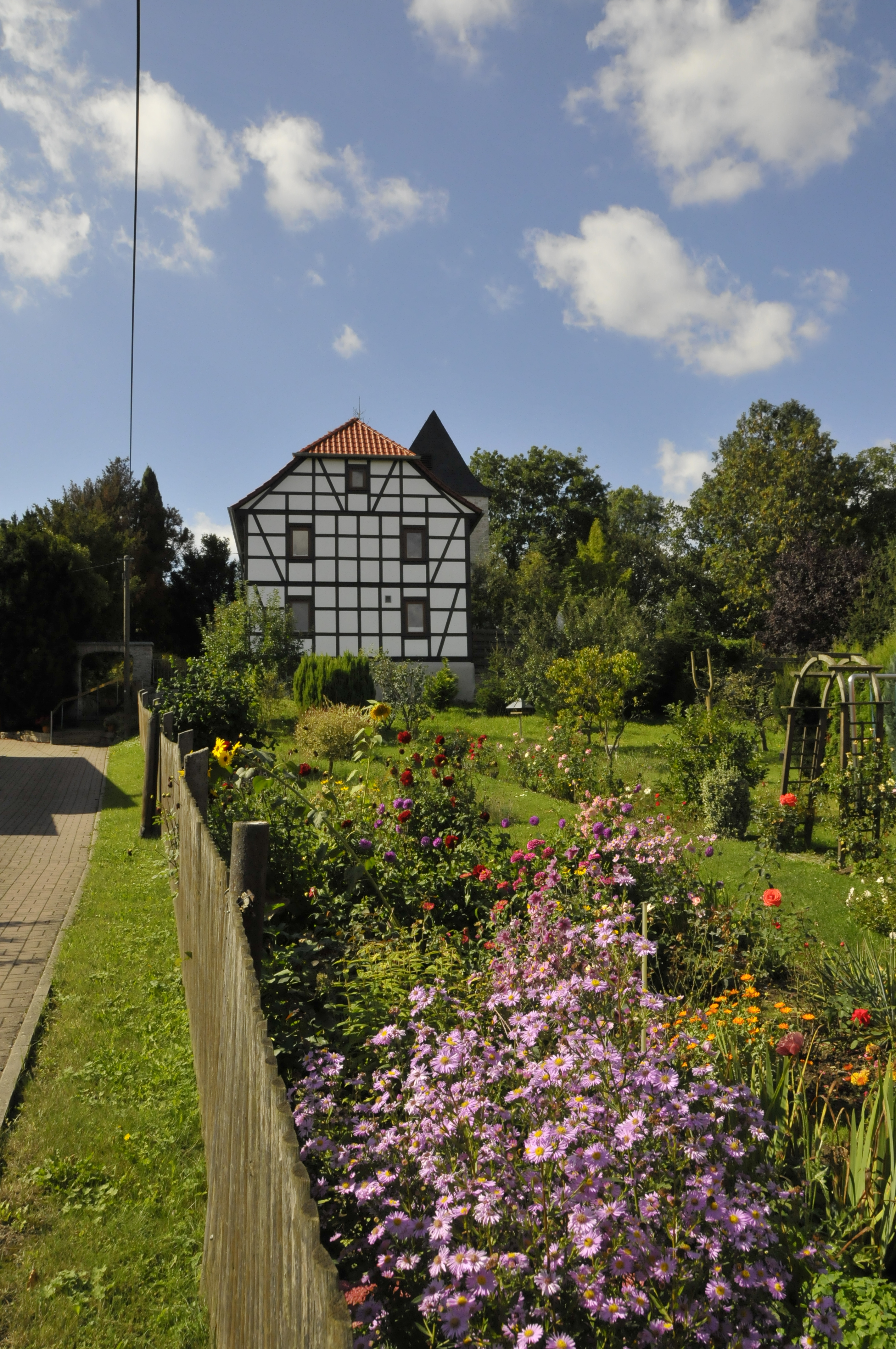 Metebach